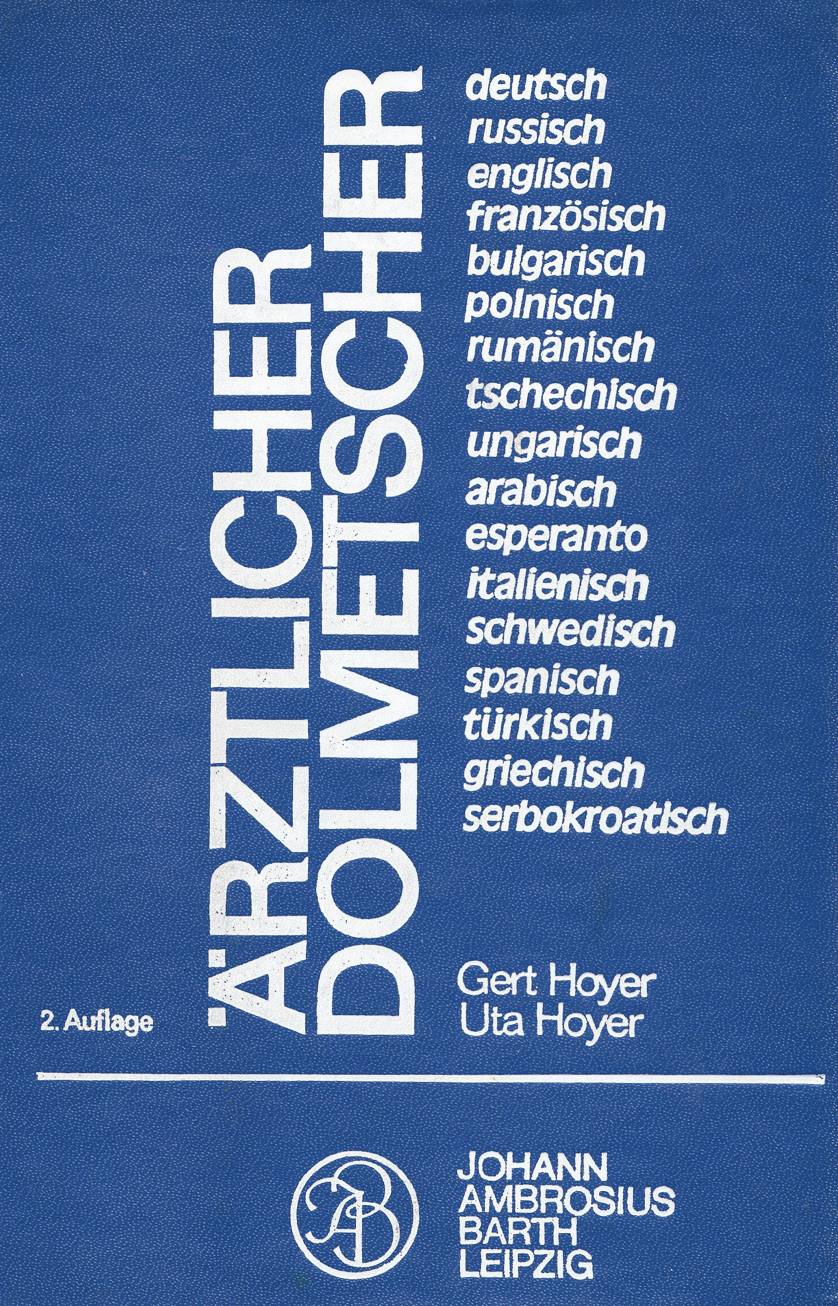 Ärztlicher Dolmetscher